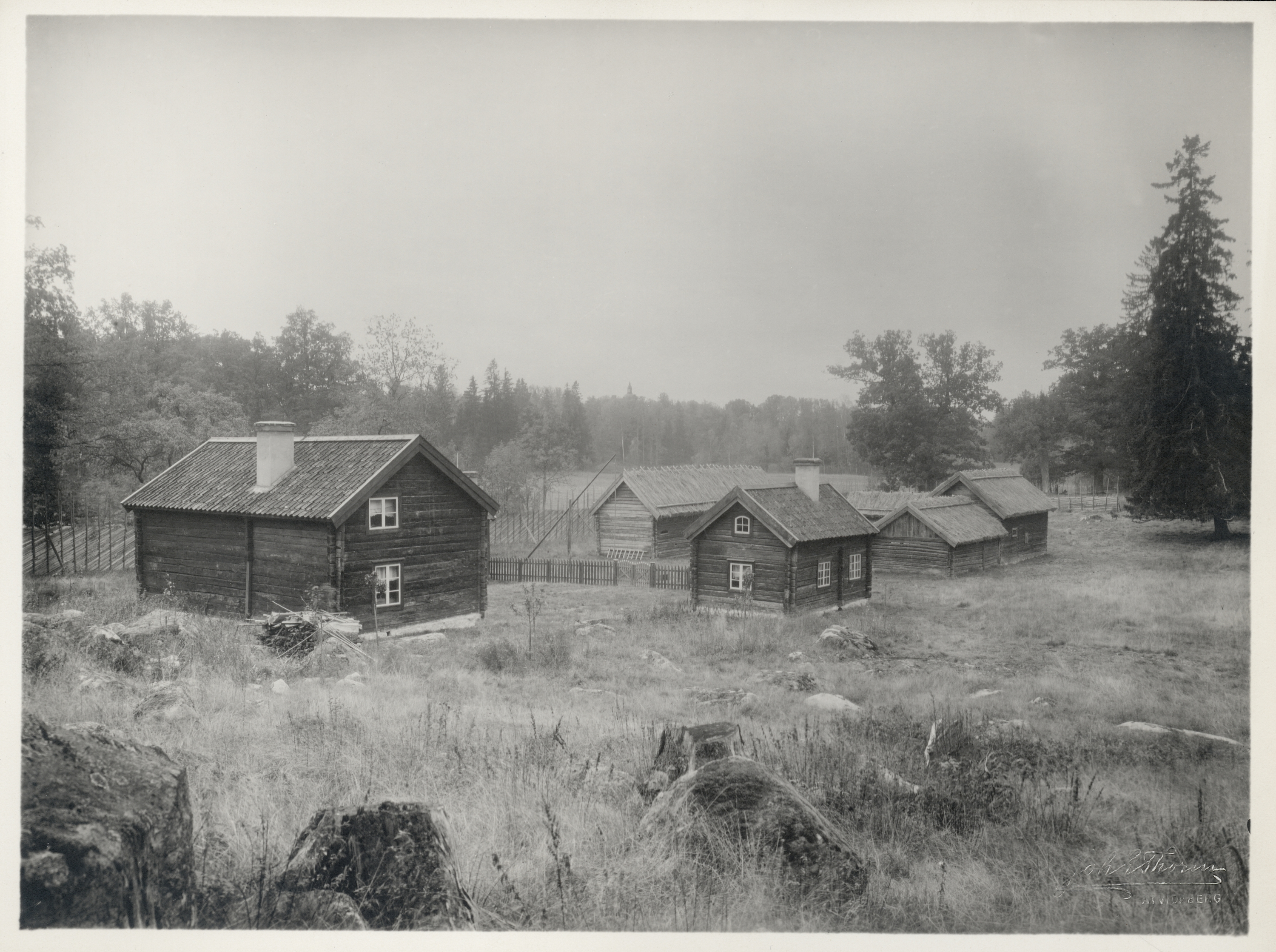 "Fotografi över Forngården Bjärka-Säby fr. punkt 1. Dr Erixons planskiss."